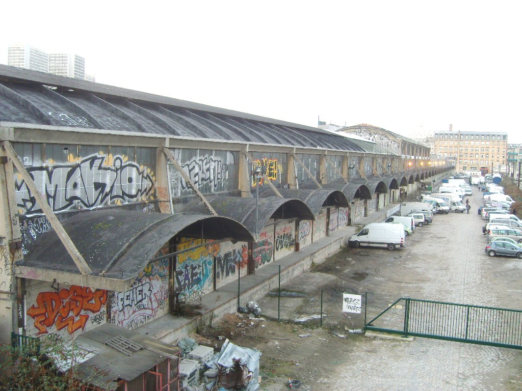 Paris 13e arrondissement - Halle Freyssinet, ancienne halle ferroviaire - vue arrière, côté voies ferrées